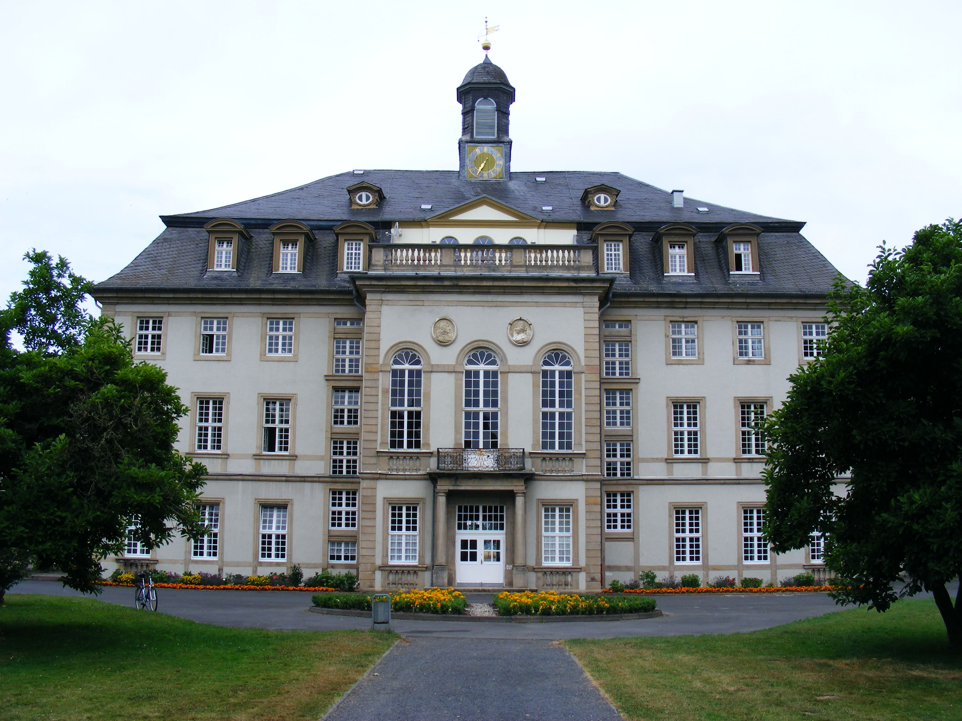 Jagdschloss Wabern (Hessen), Ansicht vom Park